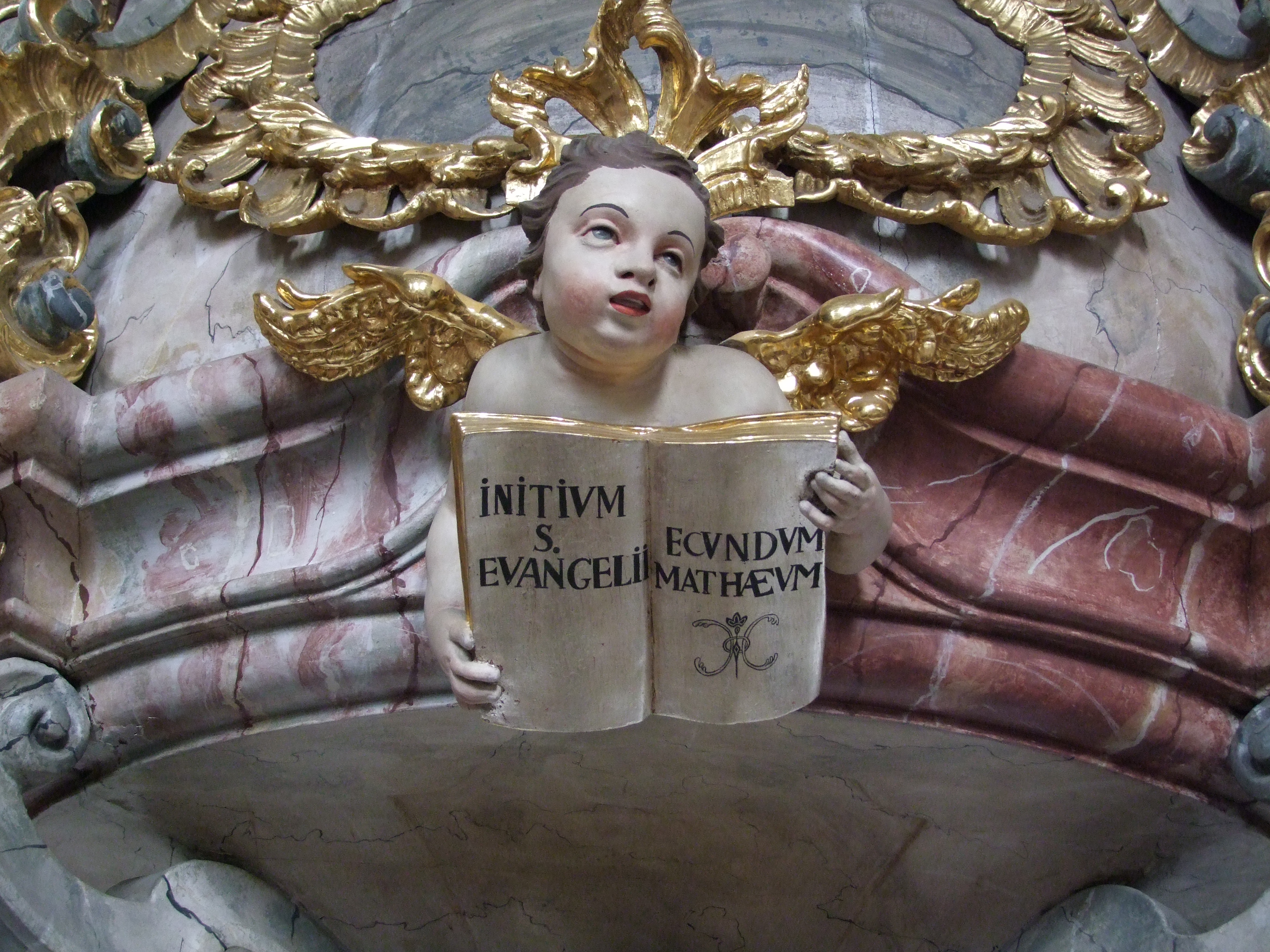 St. Michael in Stockach in Schwaben